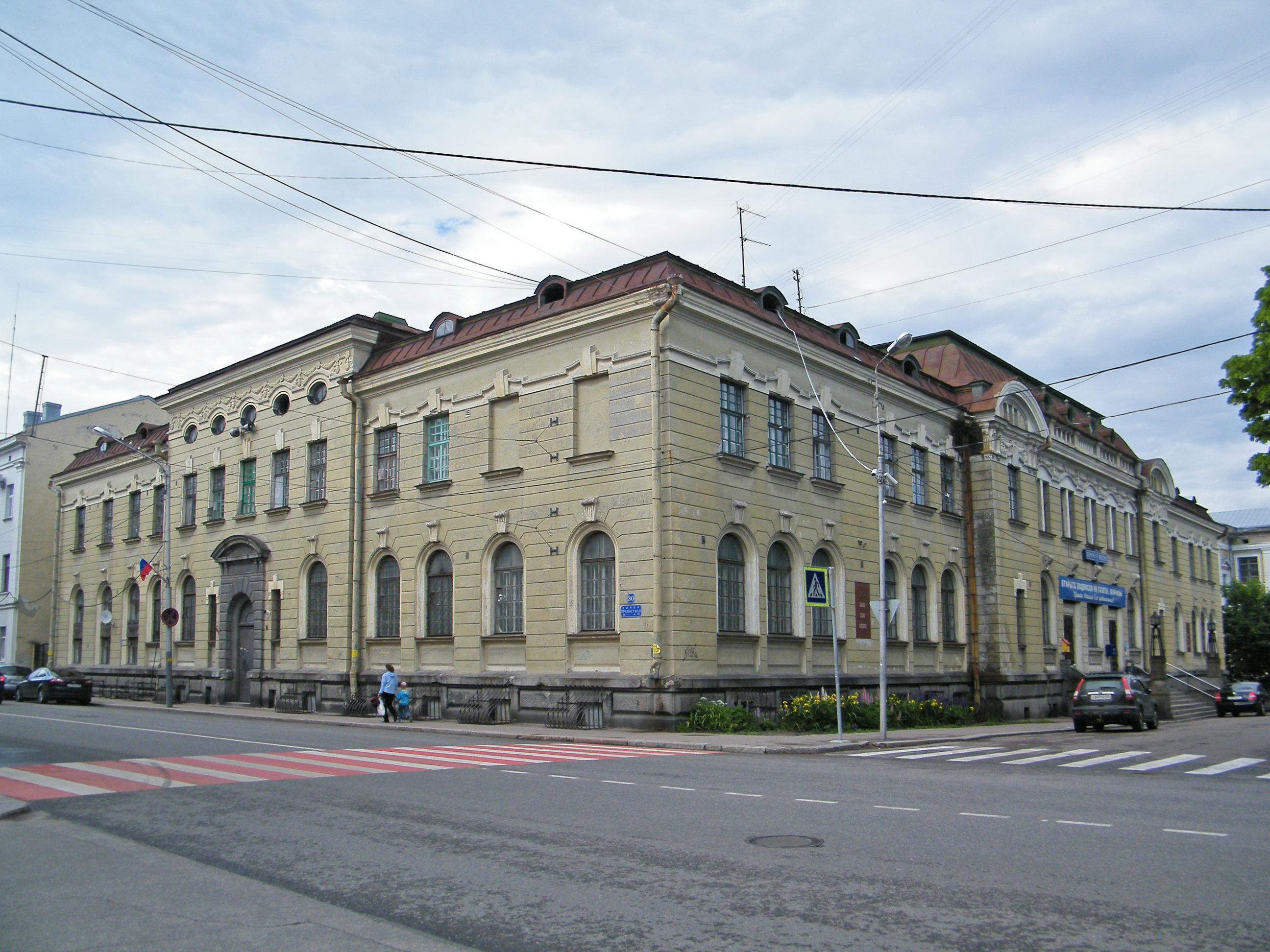 Здание Почтамта